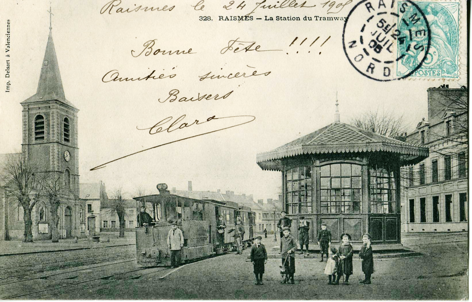 Carte postale éditée par Delsart à Valenciennes, n°328 :RAISMES - La station du Tramway